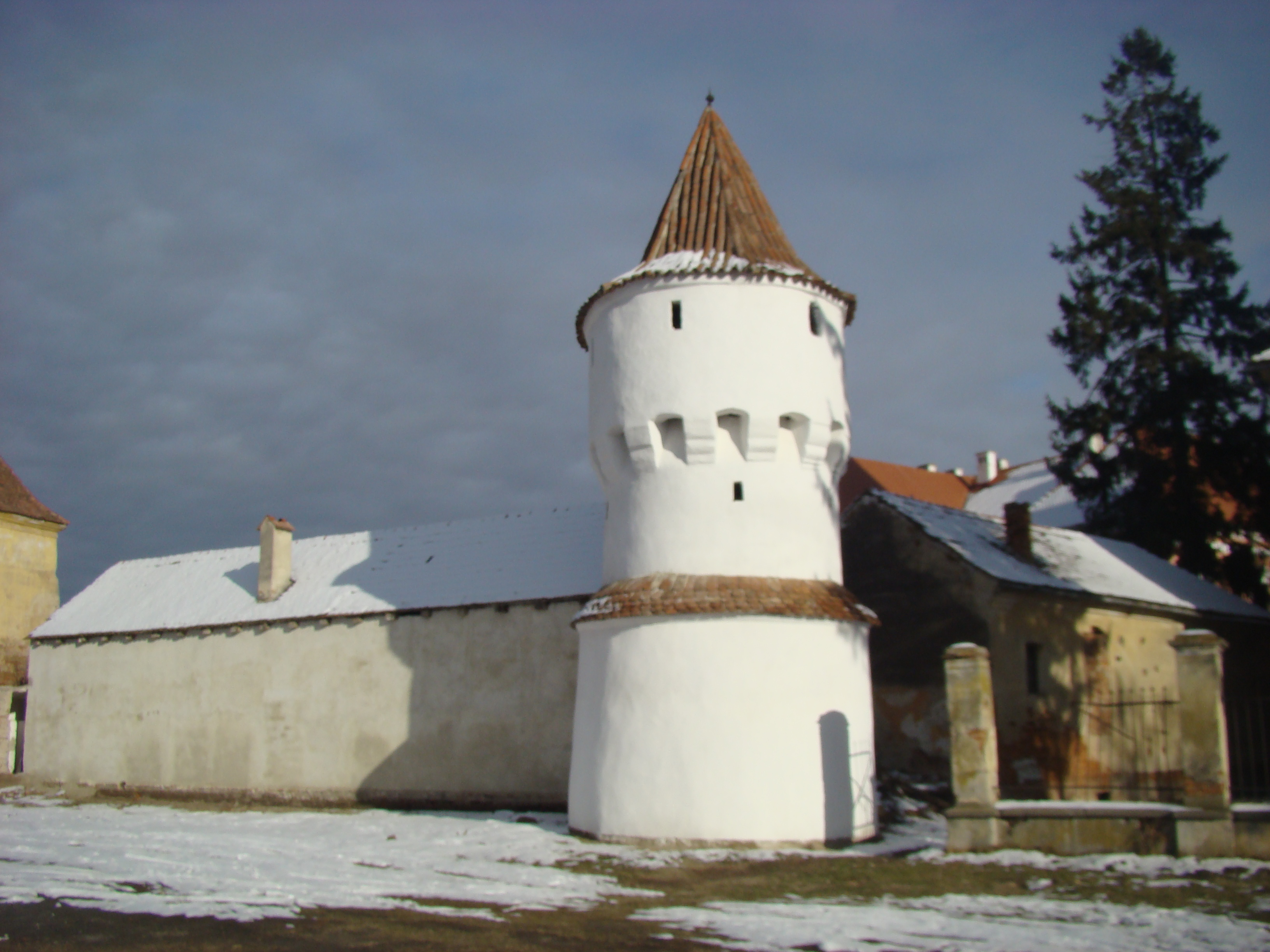 Biserica evanghelică din Nocrich, județul Sibiu